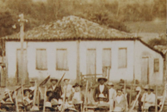 Casa Comercial de Francisco de Oliveira Sousa. Acervo de Enerson Xuxa Harger